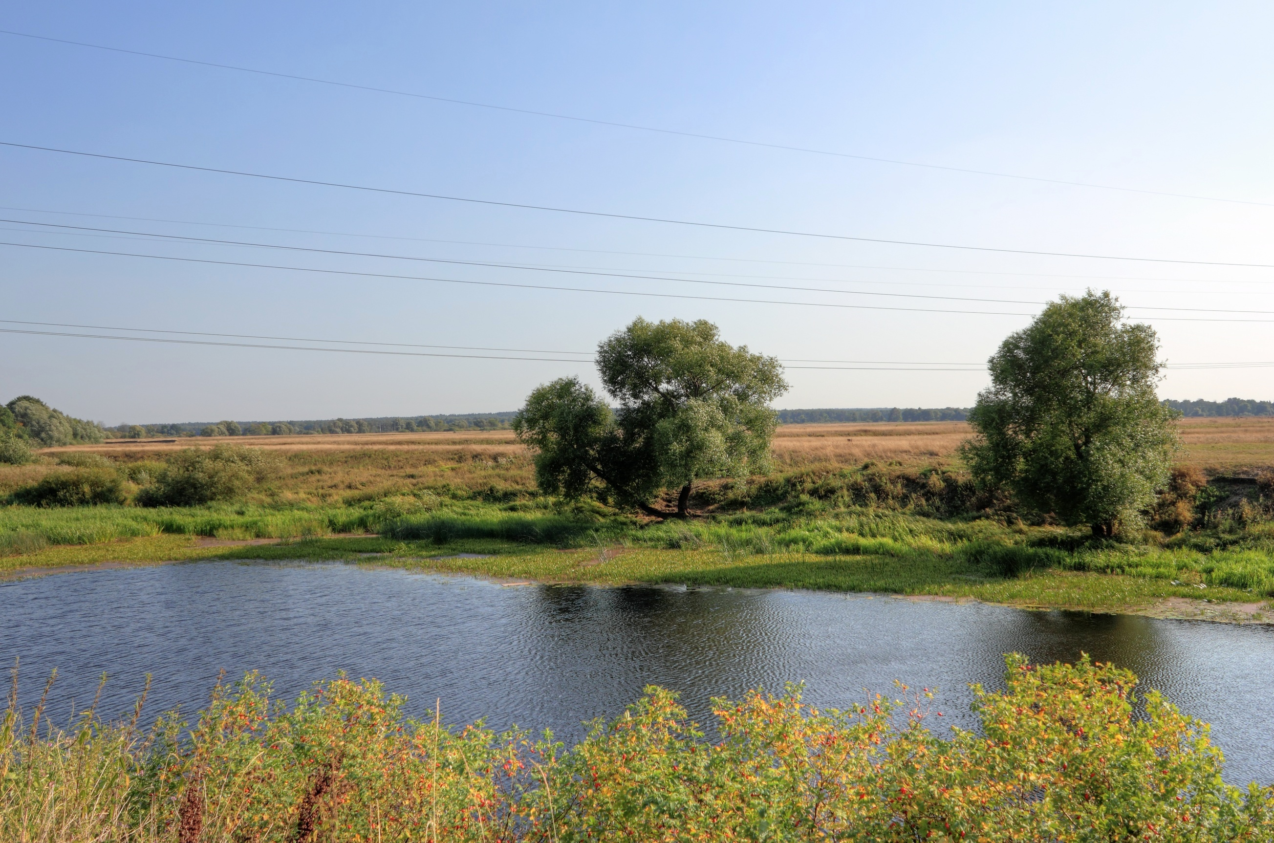 Bogolyubovo Боголюбово